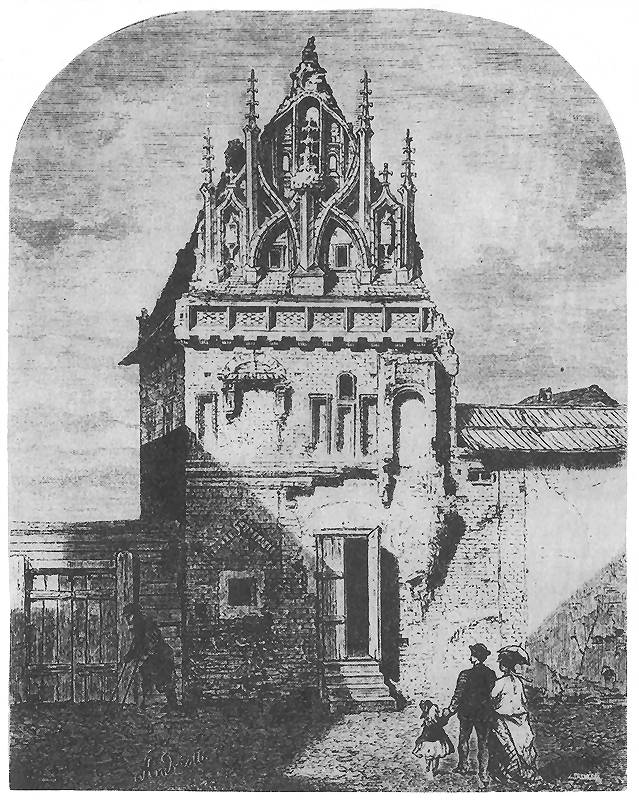 Michał Elwiro Andriolli.